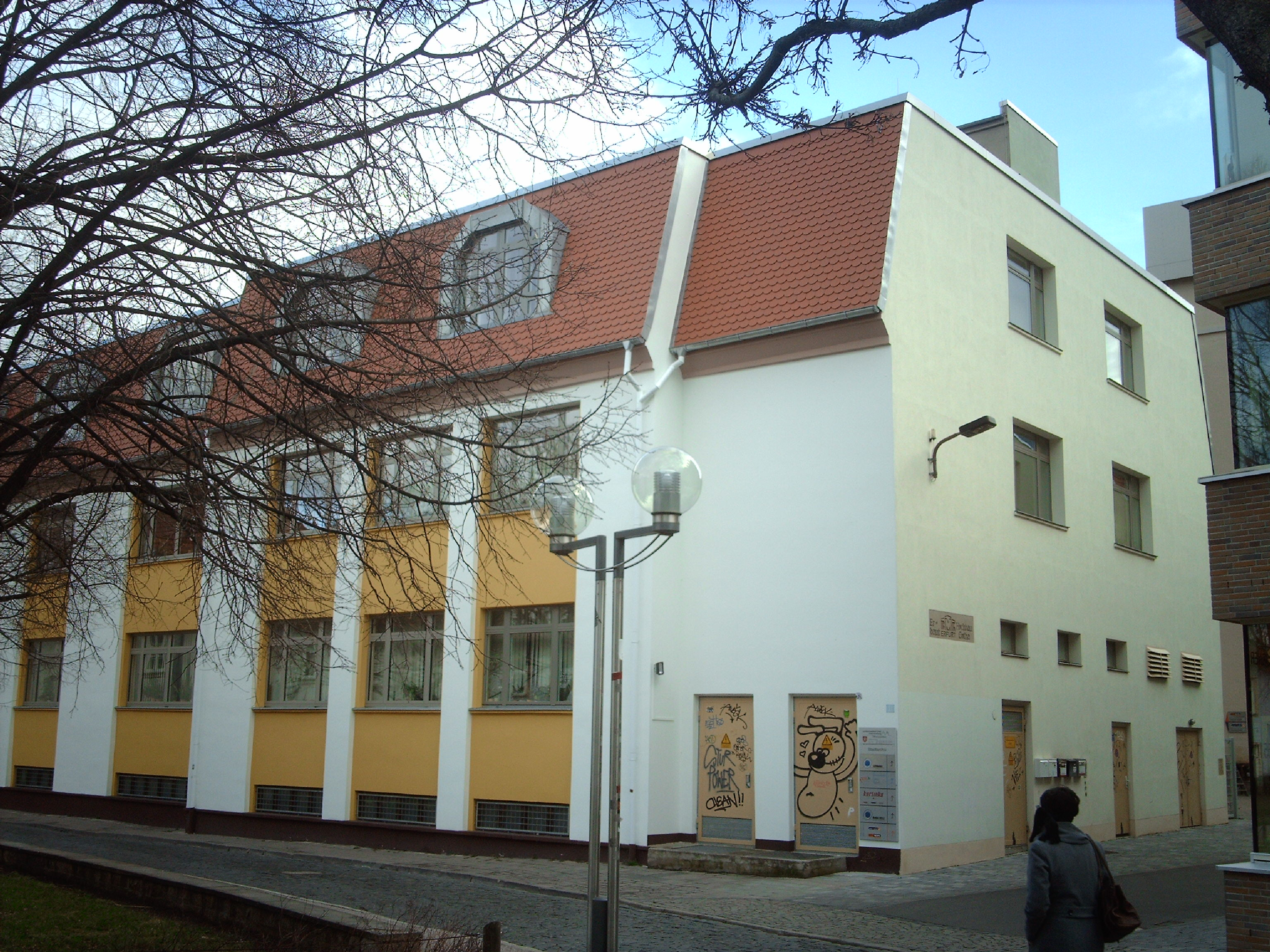 Stadtarchiv Erfurt in der Gotthardtstraße 21.